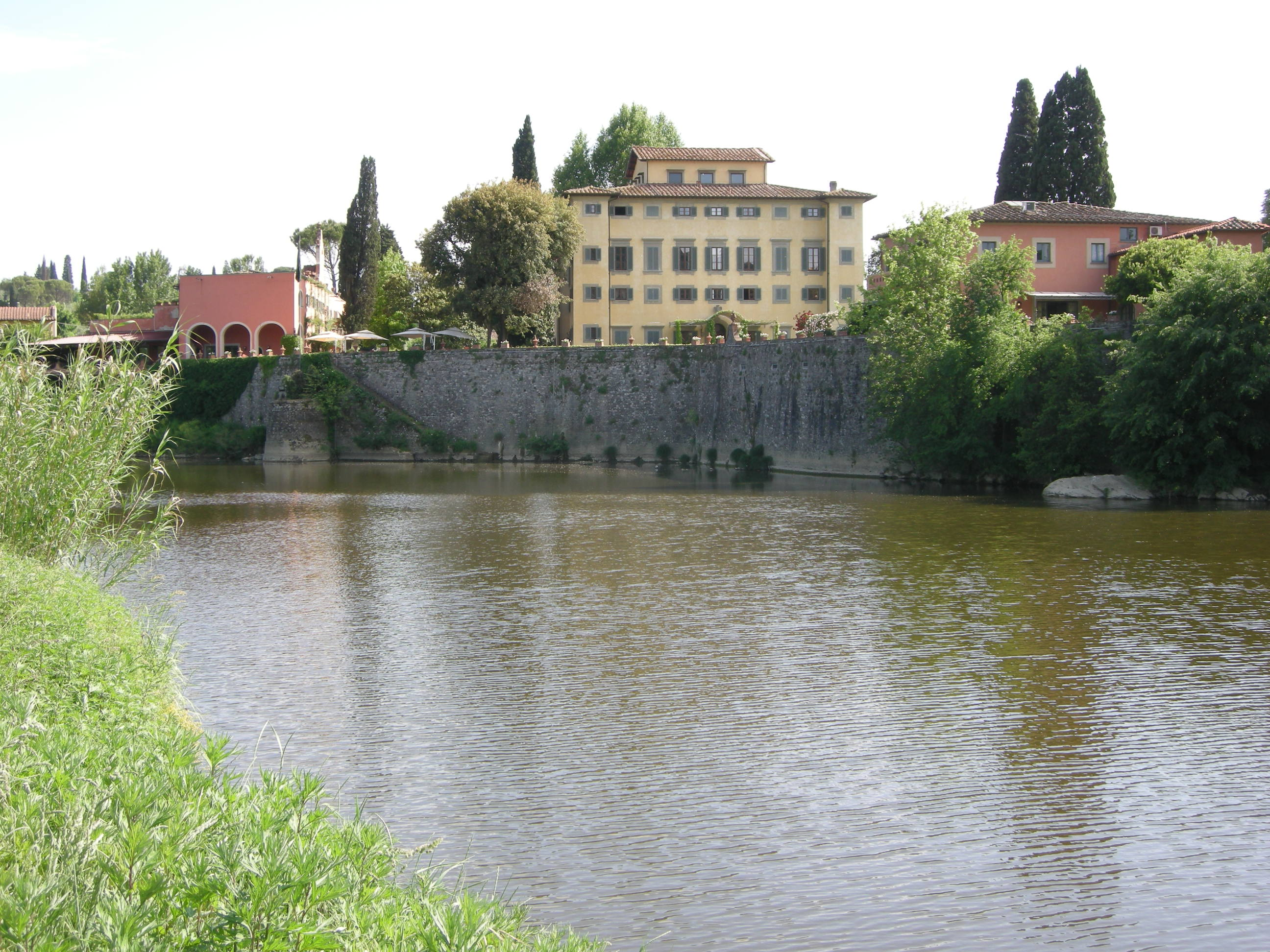 Vila la massa